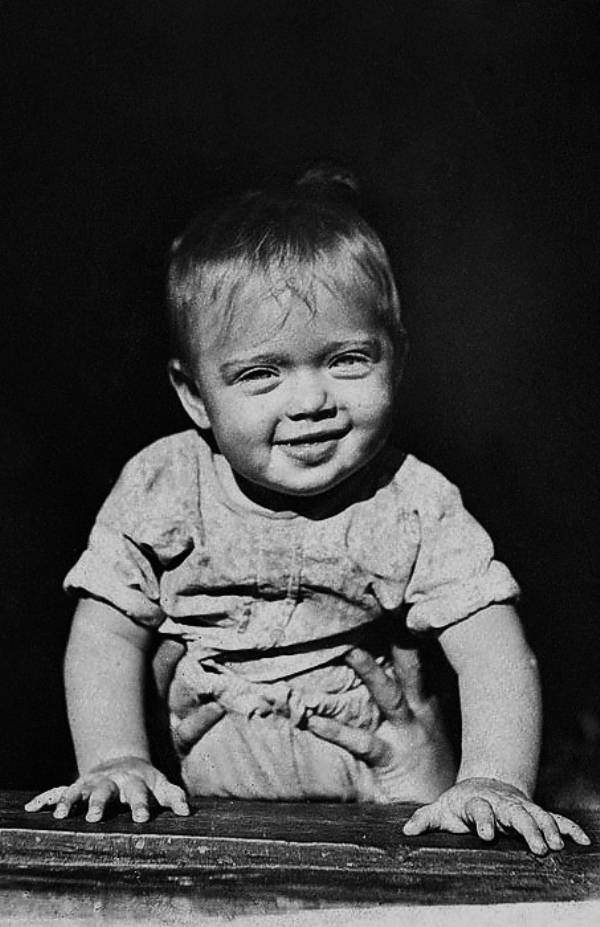 Детское фото Алисы Фрейндлих, 1930-е годы